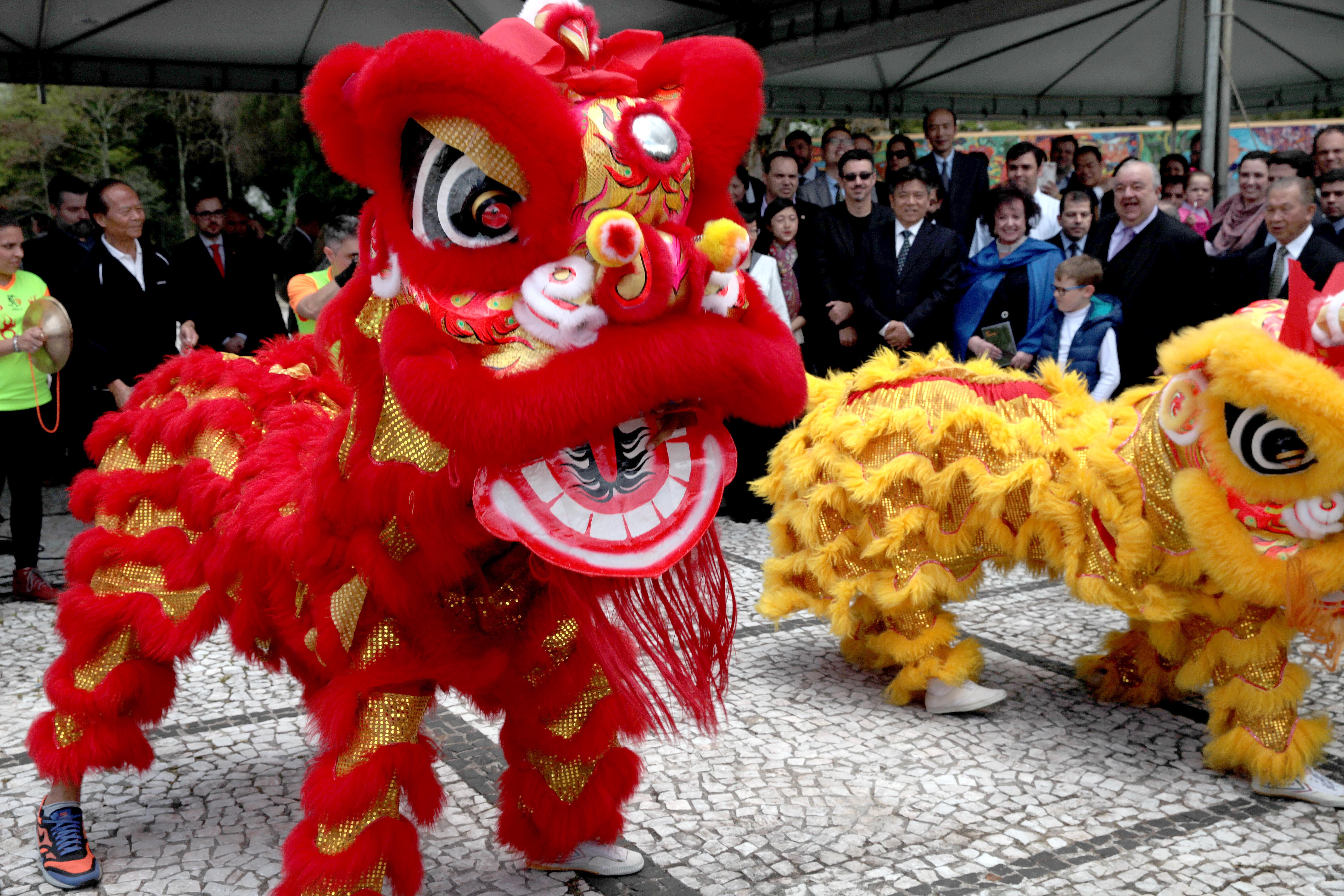 Curitiba 05-10-2017 O tapete, quando fotografado de um celular, dá lugar a um rosto. O arroz, tradicional ingrediente chinês, fica colorido em tela e o bicho da seda é um dos elementos usados para realizar uma obra. Tudo isso pode ser visto na Bienal Internacional de Curitiba 2017, evento apoiado pelo Ministério da Cultura (MinC), em cartaz até 25 de fevereiro de 2018. O evento, considerado o maior da América Latina, reúne 425 artistas nacionais e internacionais em 100 espaços diferentes da capital paranaense. Um deles é o museu Oscar Niemeyer (MON) que, de 12 salas, tem seis dedicadas à Bienal. A expectativa é que, até fevereiro, cerca de 1 milhão de visitantes passem por lá. Neste ano, uma das grandes atrações é o país homenageado, a China. Fotos: Acacio Pinheiro